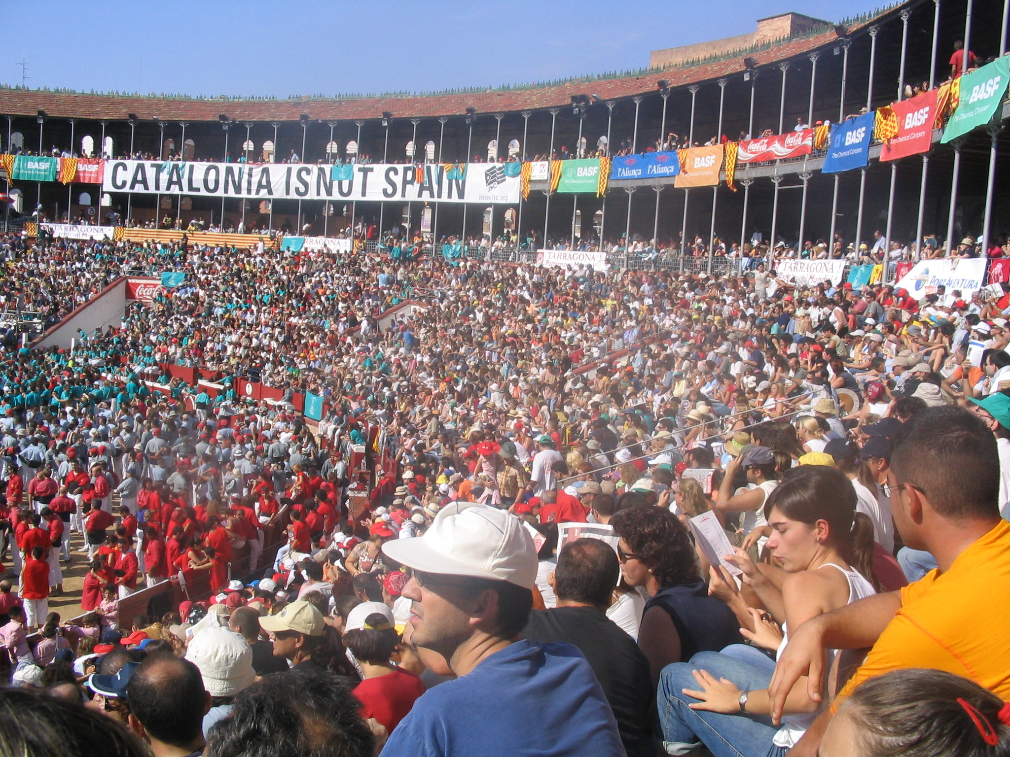 Concurs de Castells de Tarragona 2004. Missatge independentista "Catalonia is not Spain"